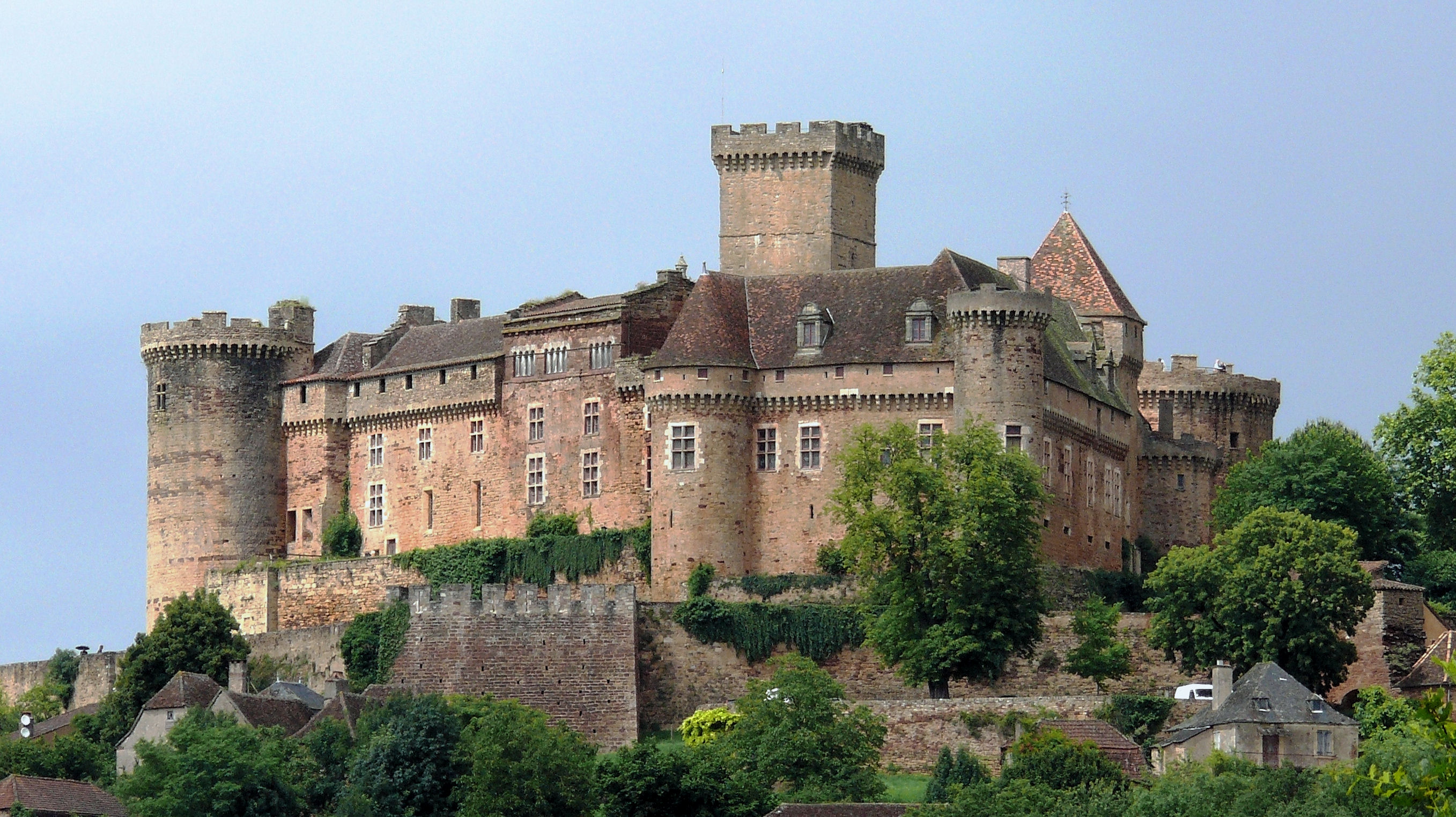 Château de Castelnau-Bretenoux - Ensemble